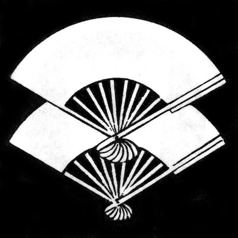 二階扇